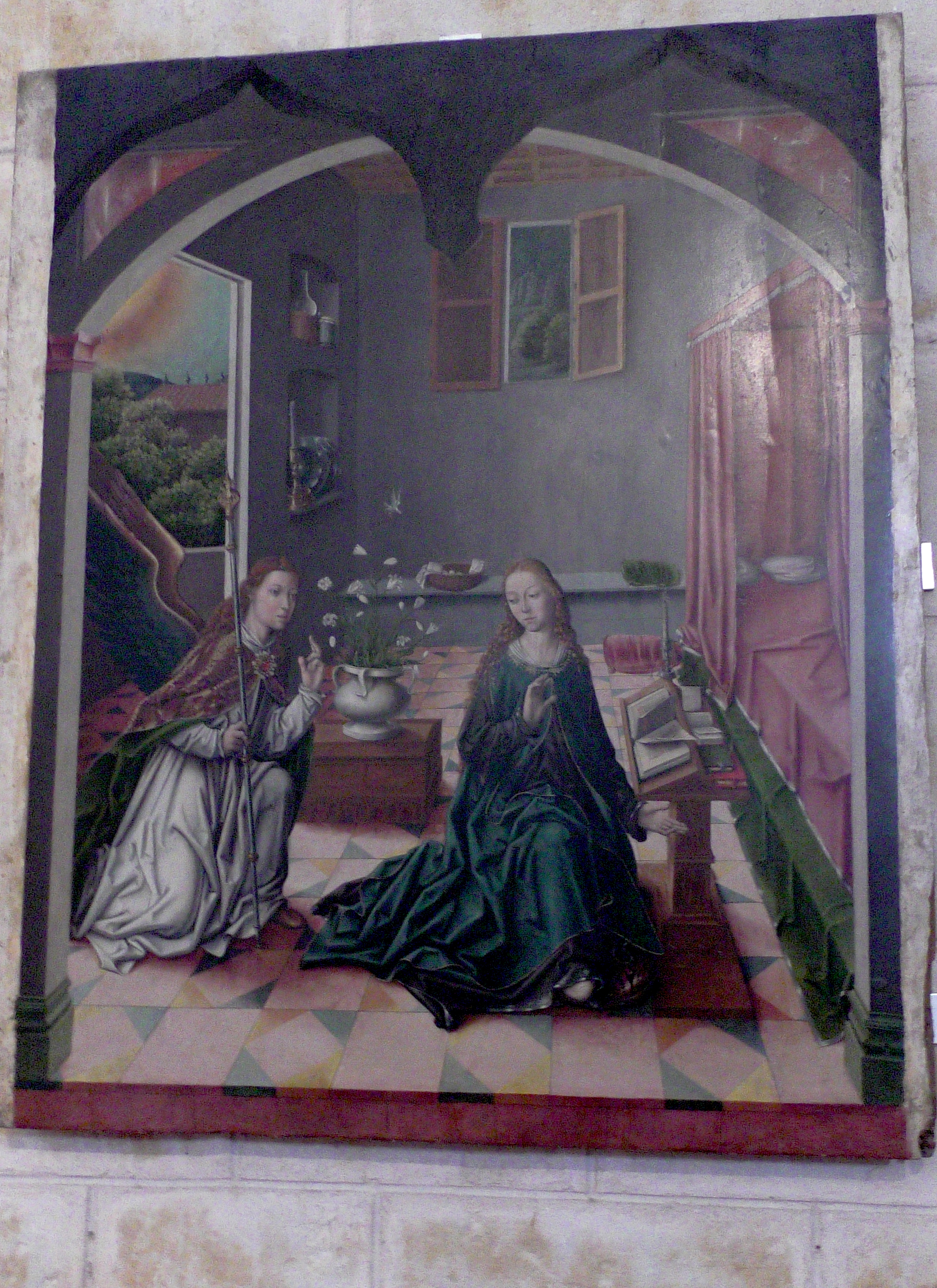 Iglesia de la Asunción